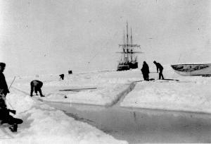 L'equipaggio della Belgica scavano i canali per liberare la nave